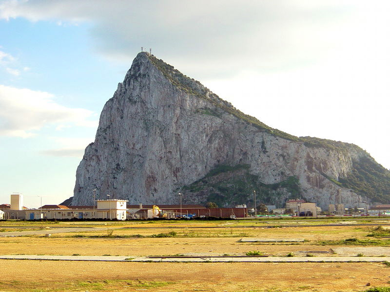 Vista del peñón de Gibraltar desde el otro lado de la frontera.